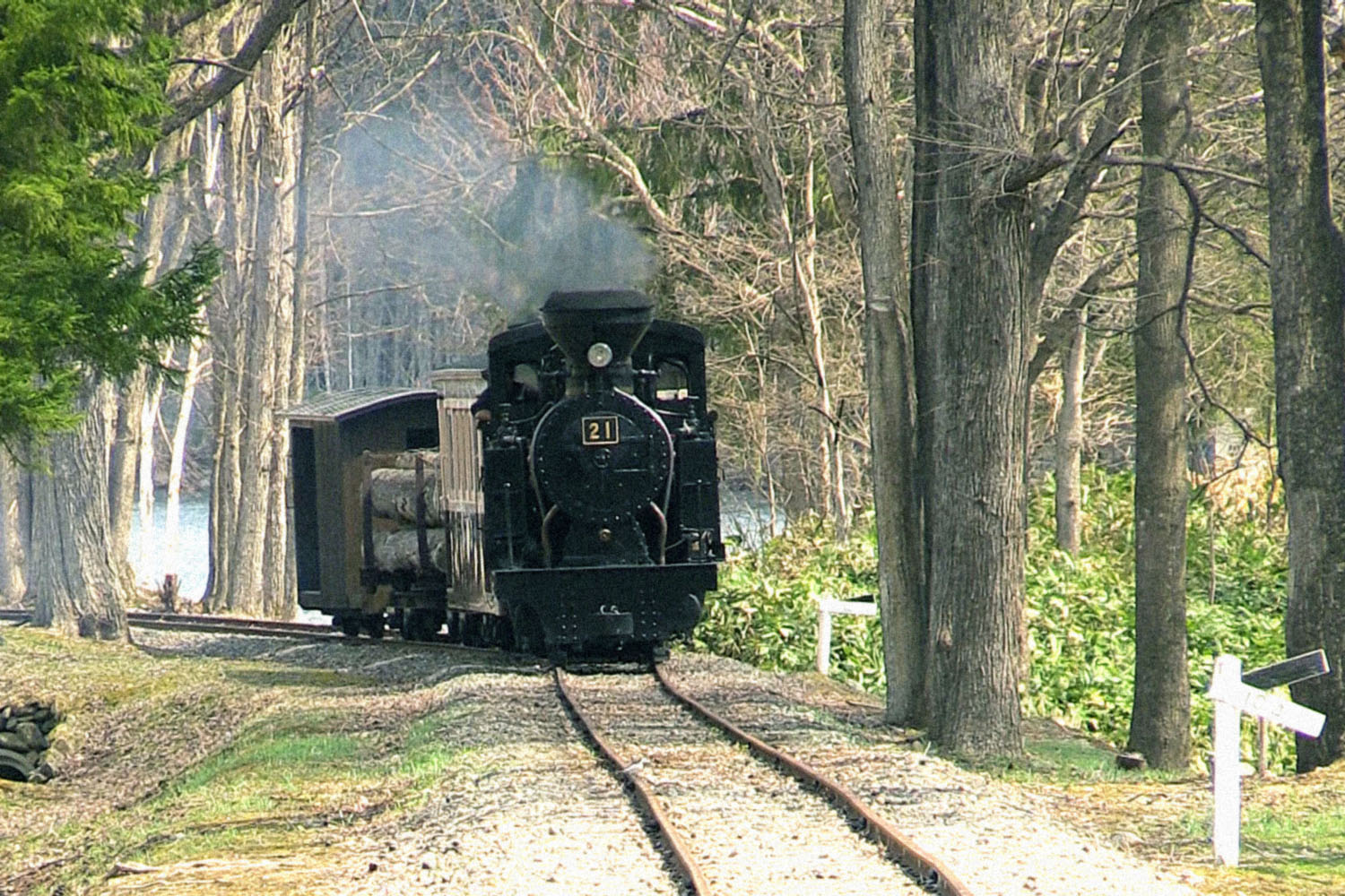 北海道遠軽町「丸瀬布森林公園いこいの森」園内軌道の旧武利森林鉄道区間（2015年撮影）